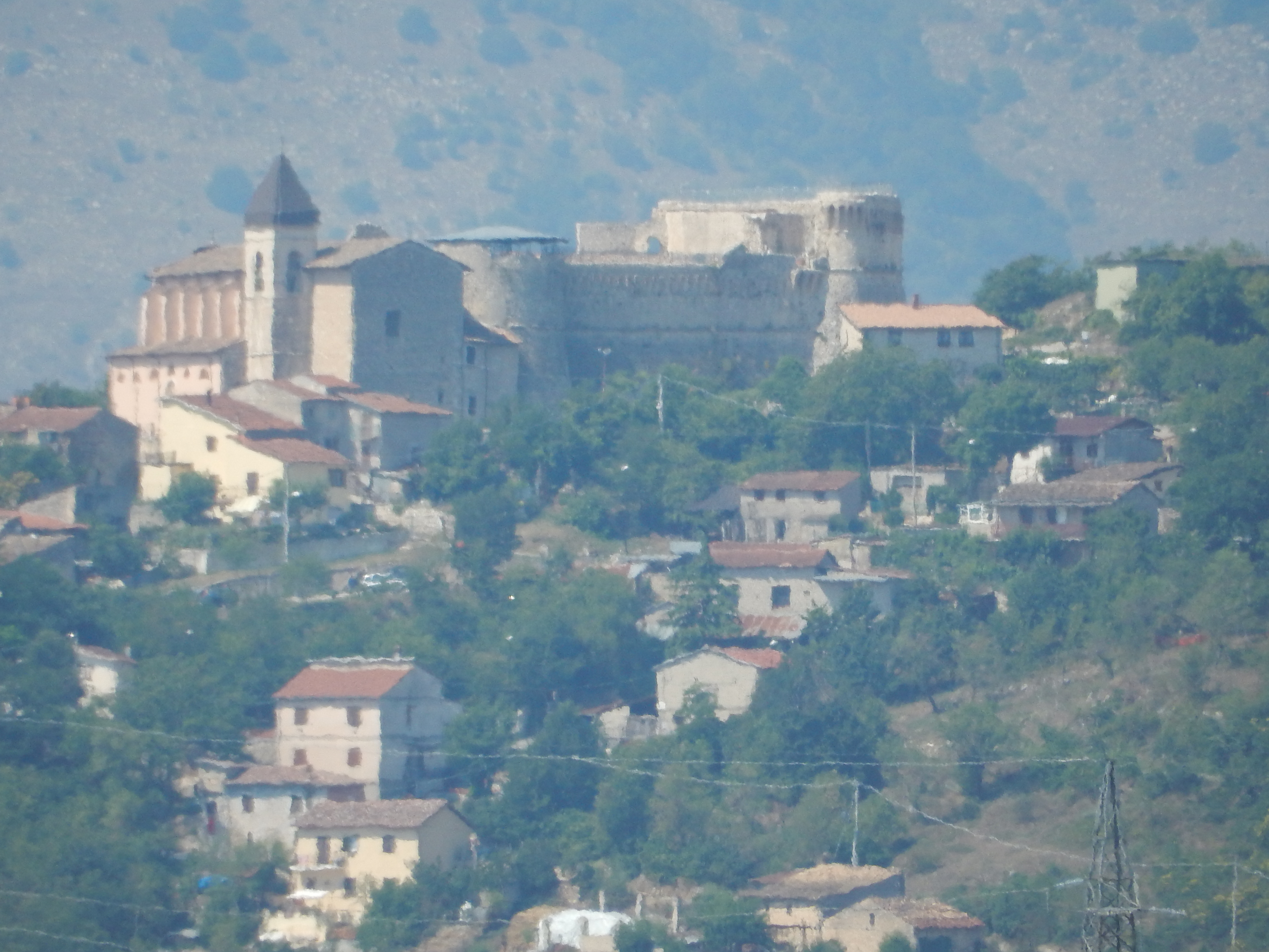 Castello Orsini a Scurcola Marsicana, L'Aquila.